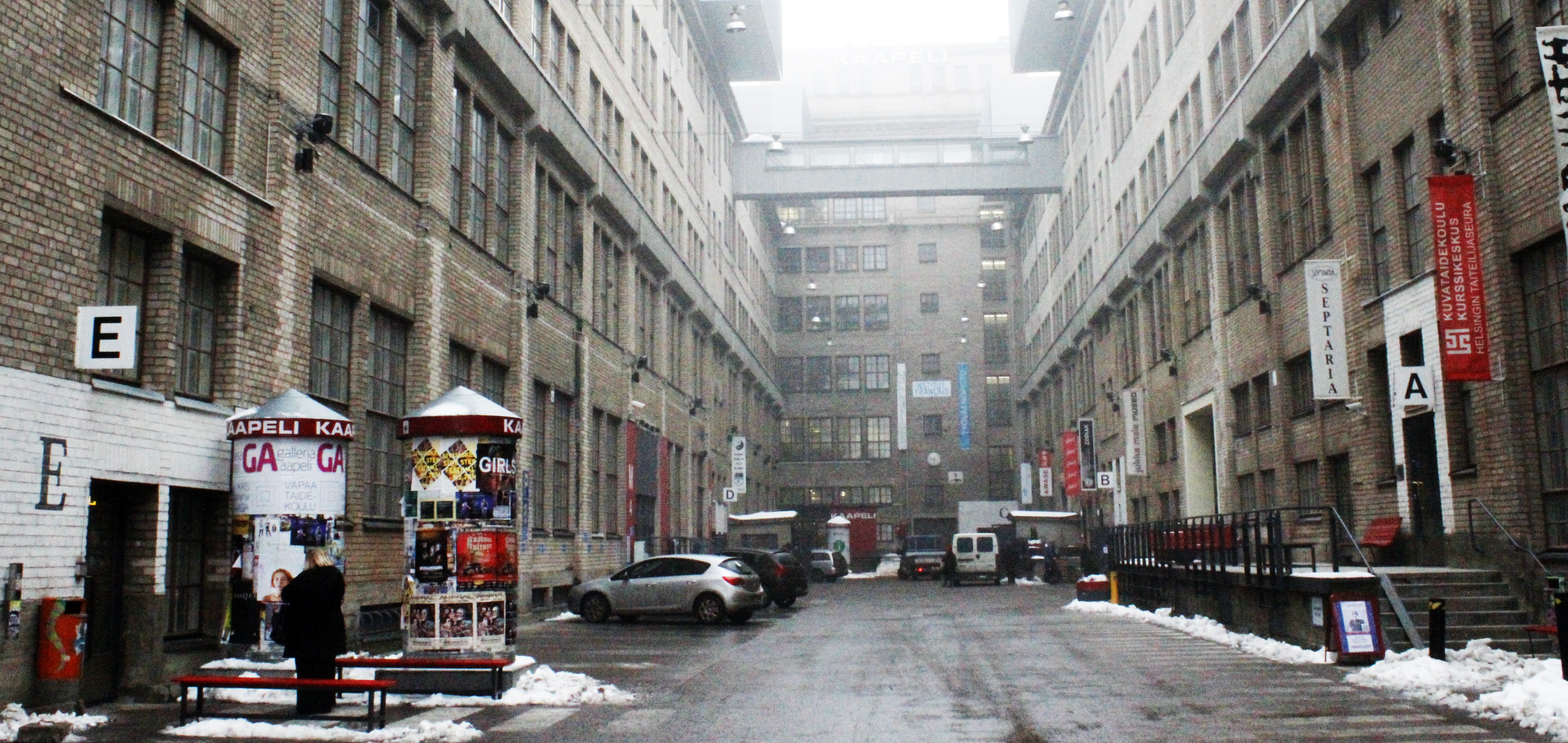 Kuva Kaapelitehtaan sisäpihalta.